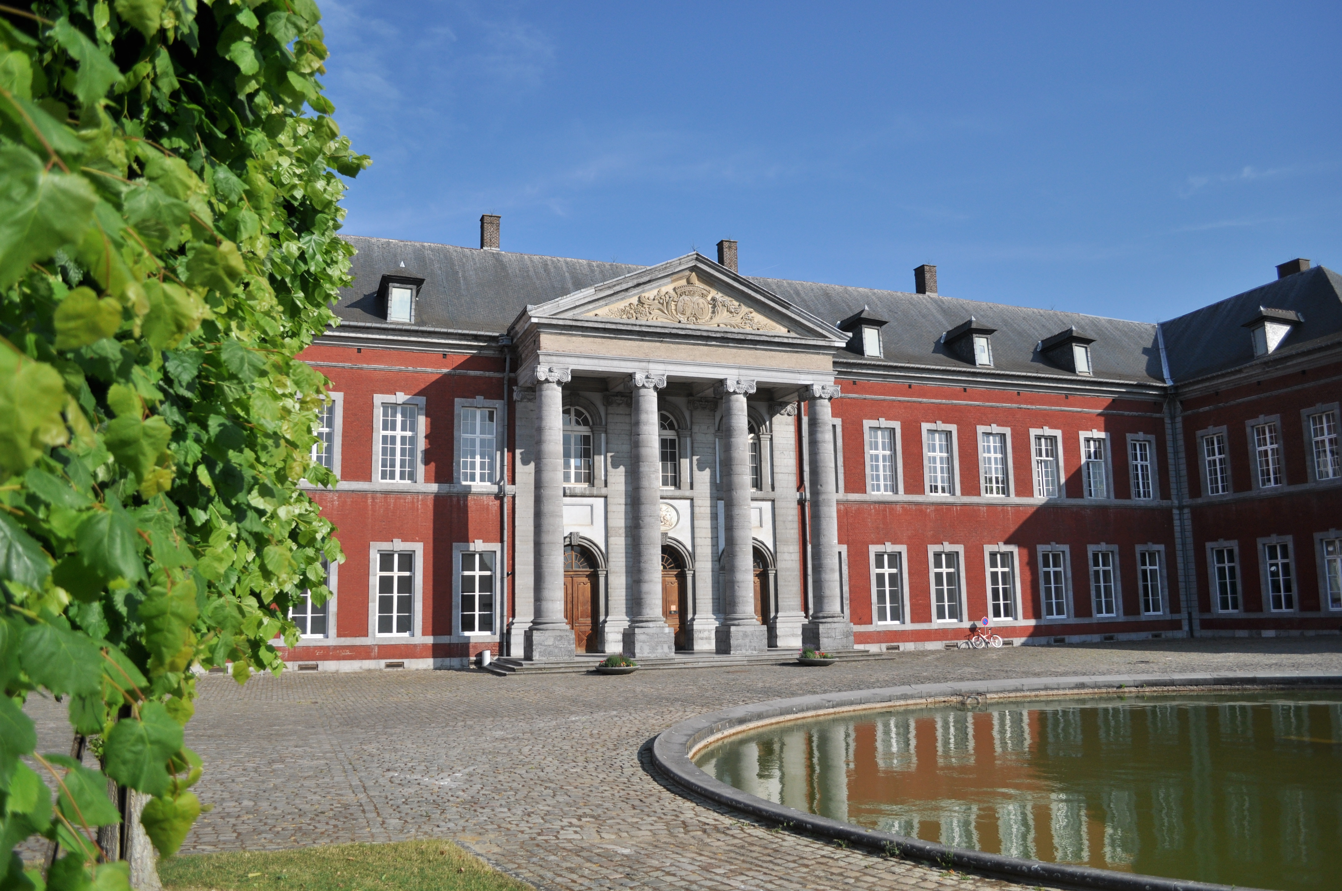 Façade du palais abbatial, portique et cour d'honneur de l'ancienne abbaye de Gembloux. Œuvre de l'architecte Laurent-Benoît Dewez (construction entre 1761 et 1780). Aujourd'hui, siège du rectorat de la Faculté universitaire des sciences agronomiques.